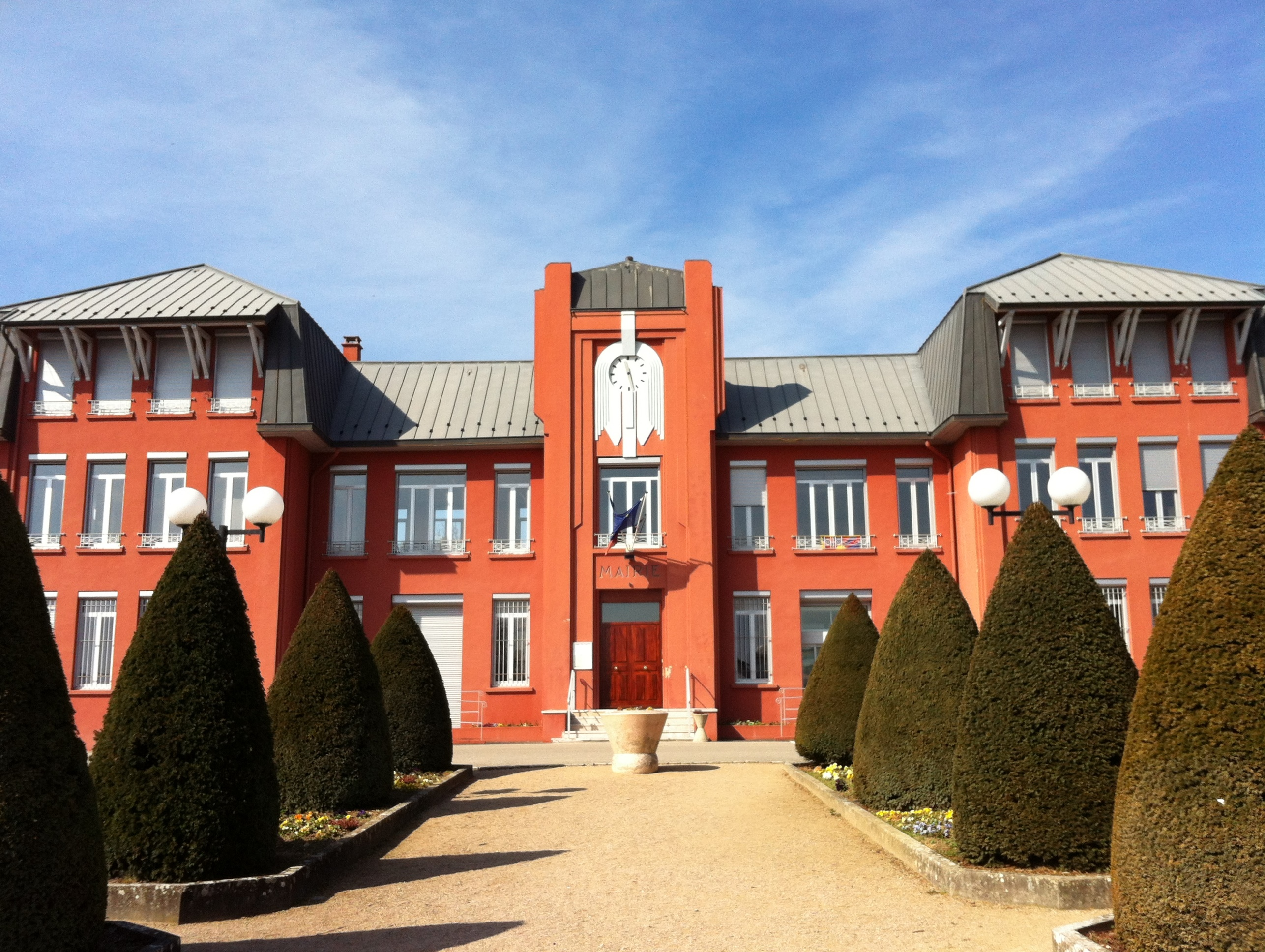 Mairie de Saint-Maurice-de-Beynost.